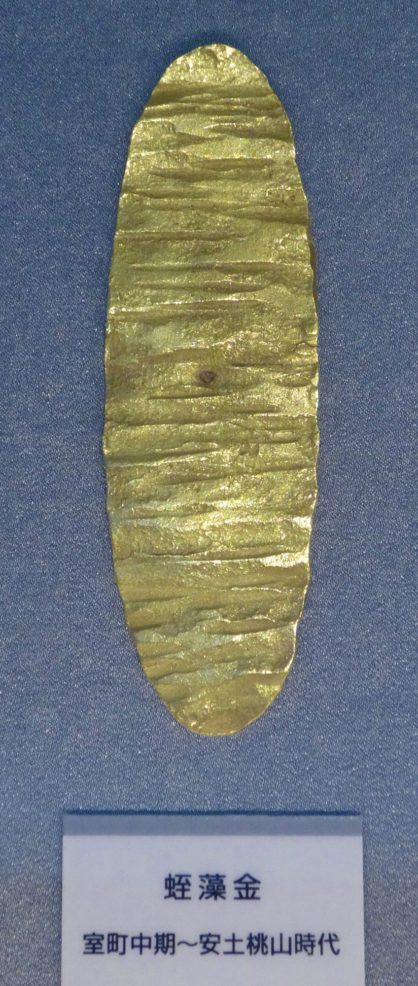 蛭藻金（造幣博物館〈大阪府〉）